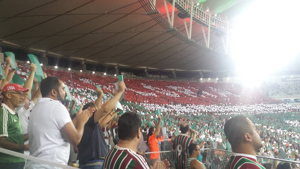 Torcida do Fluminense no Setor Sul contra o Liverpool do Uruguai se preparando para saudar a entrada do time em campo.